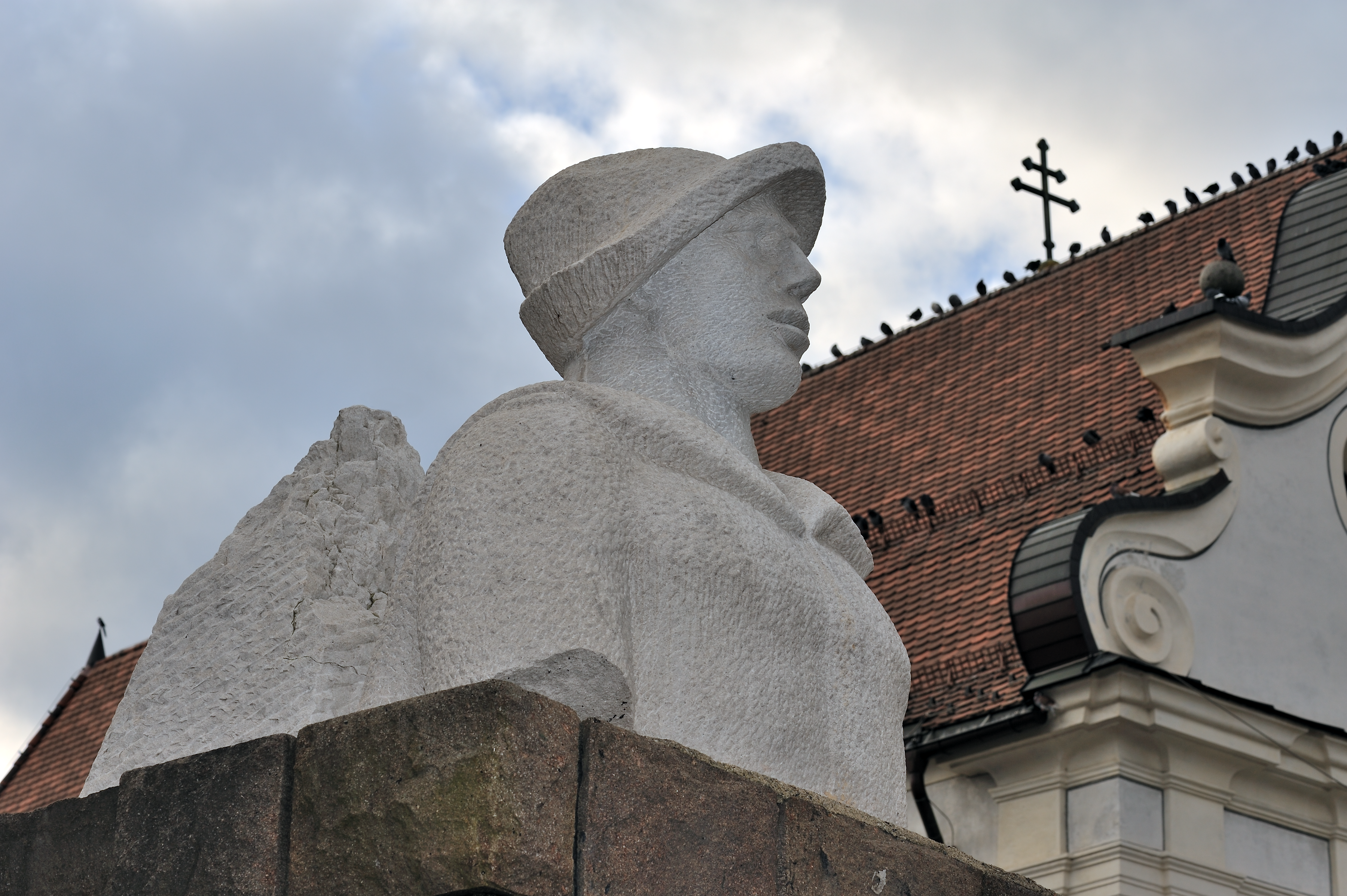 "Kapuziner Wastl", Torso des gesprengten faschistischen Alpini-Denkmals am Kapuzinerplatz in Bruneck (Südtirol) des Rudi Moroder (de Gottfried) (* 1923 in St. Ulrich † 1958 ebenda)